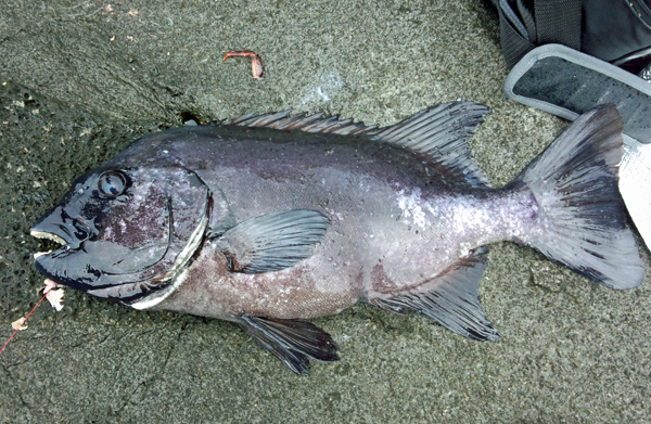 三宅島 沖磯 釣り 3.4ｋｇ japan miyakeIsland Fishing(Release)